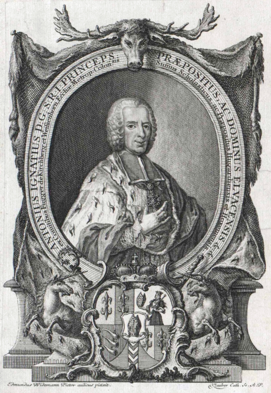 Anton Ignaz Graf Fugger von Glött (1711–1787). Bischof von Regensburg (1769–1787).